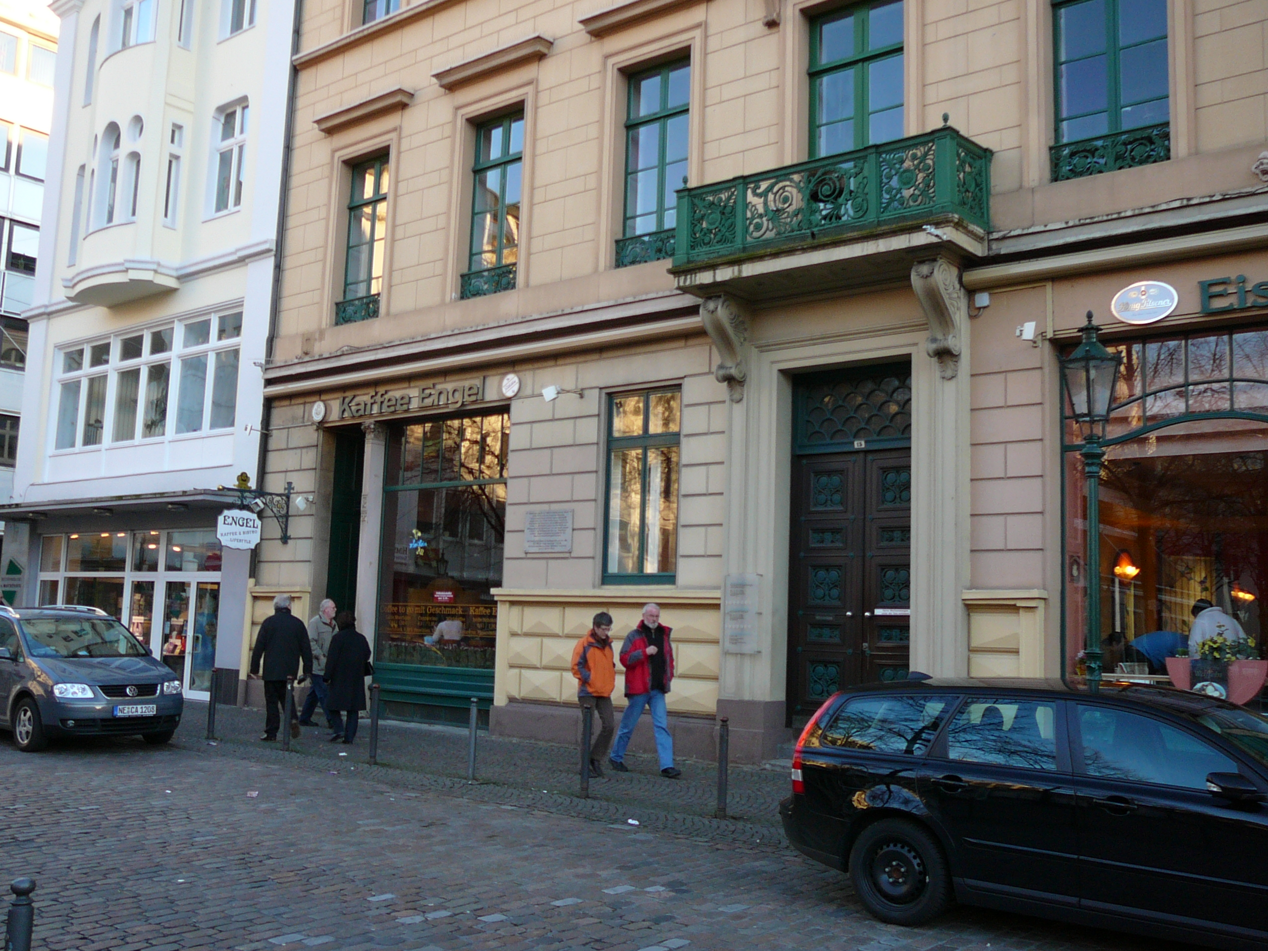 Villa in der Friedrich-Ebert-Str, Wuppertal